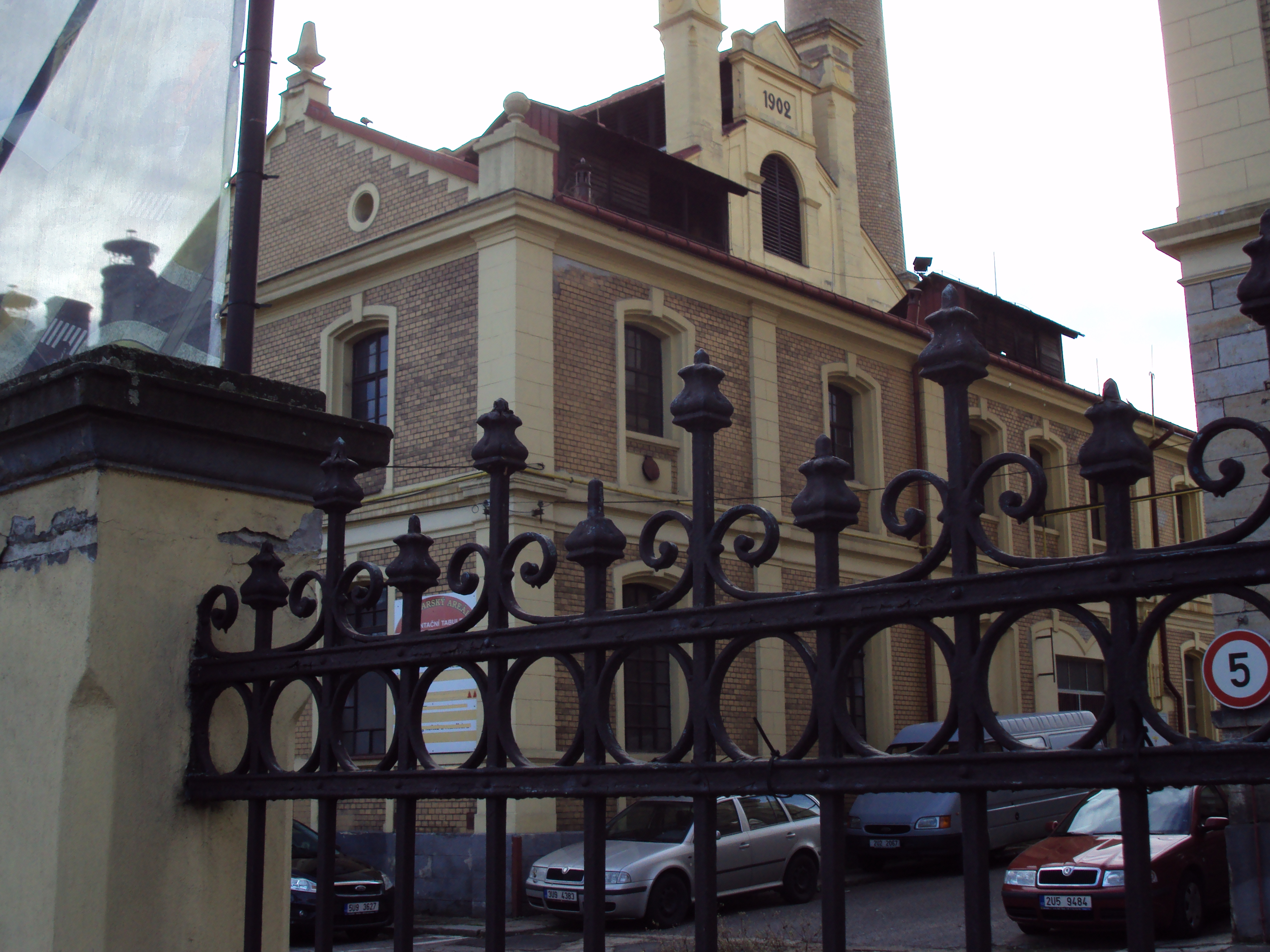 Děčín-Letná, Sofijská, pivovar.